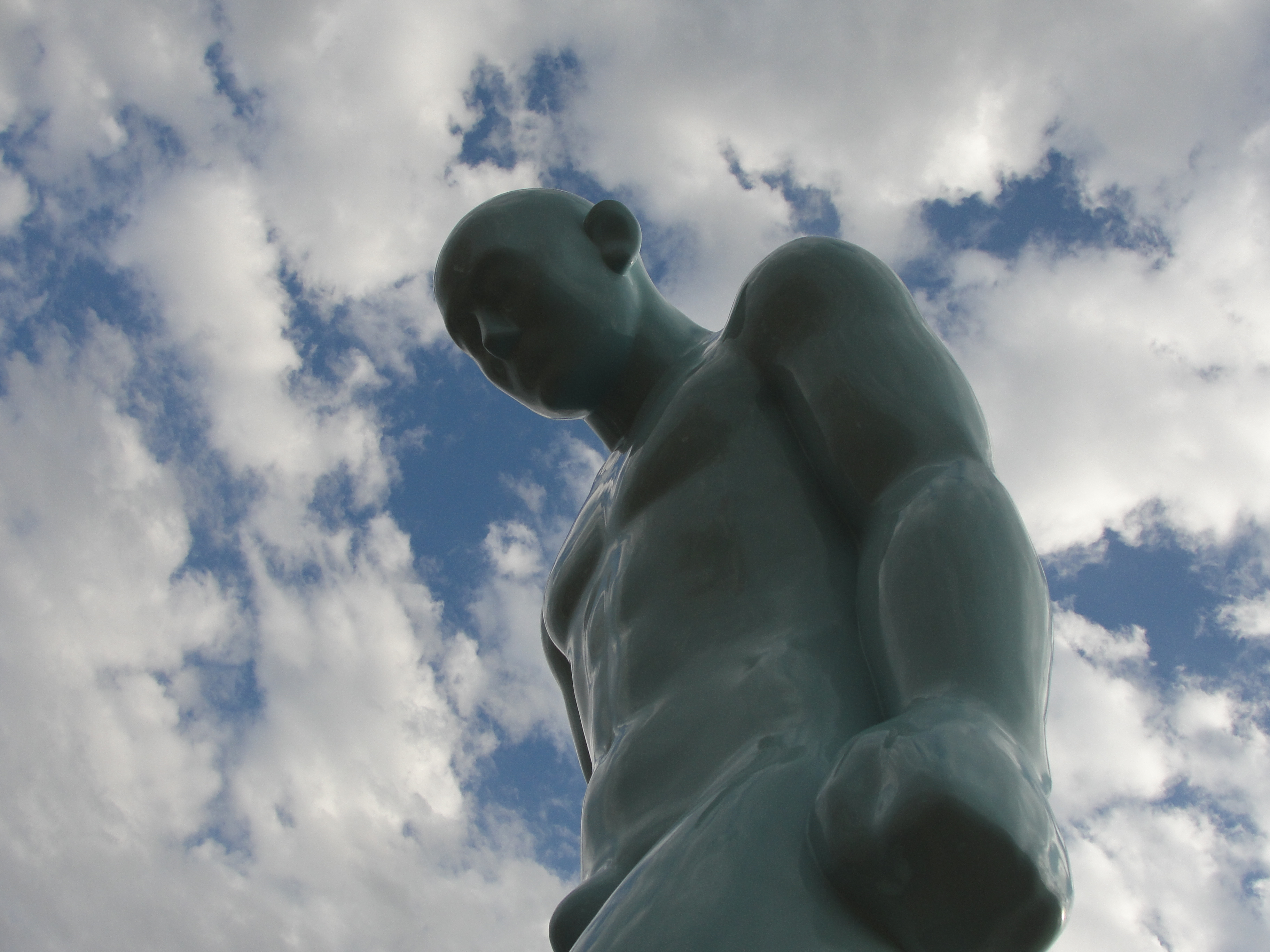 El hombre que saluda (Greetingman). Ubicada en el departamento de Montevideo